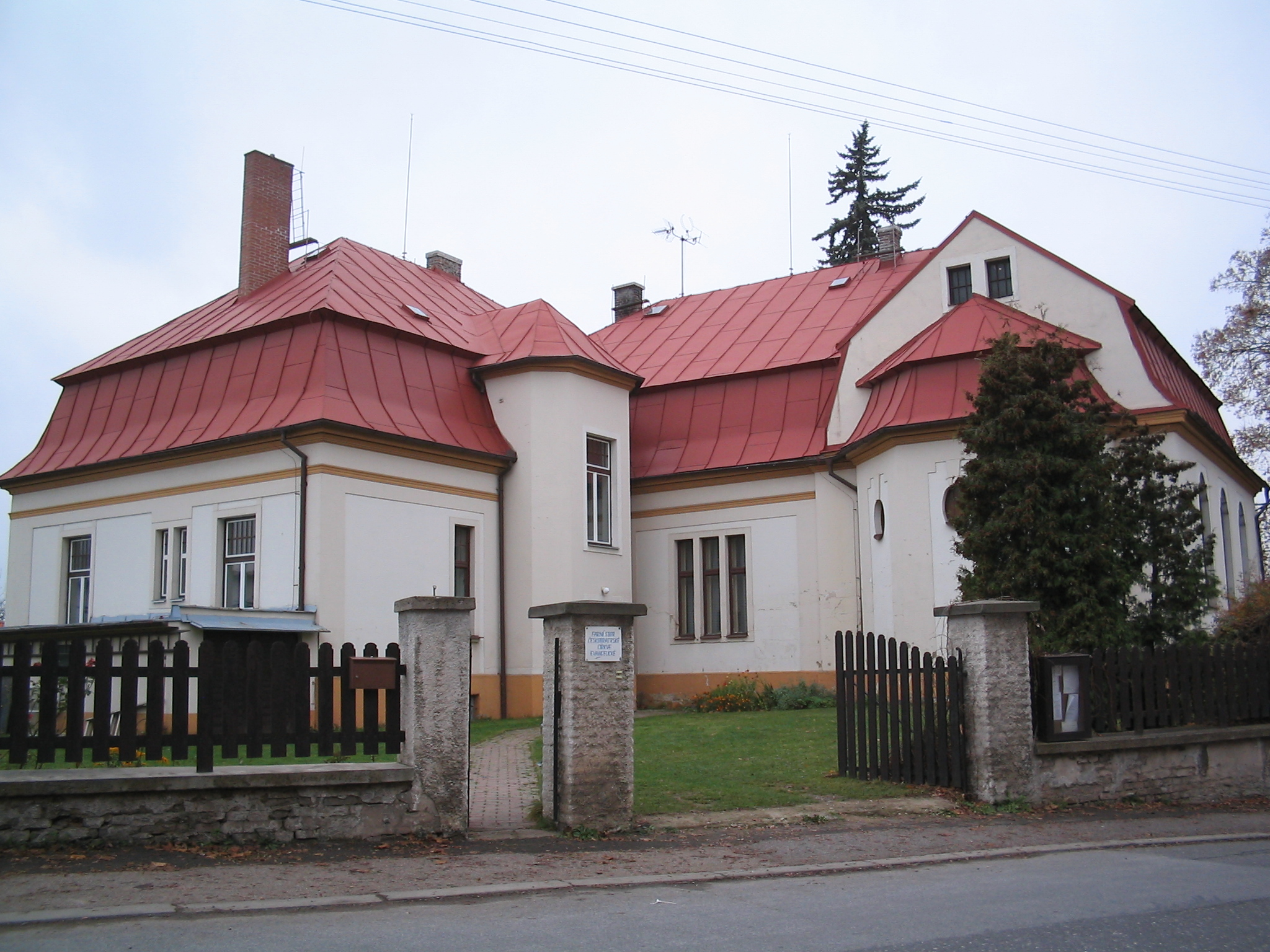 Jičínský sborový dům FS ČCE